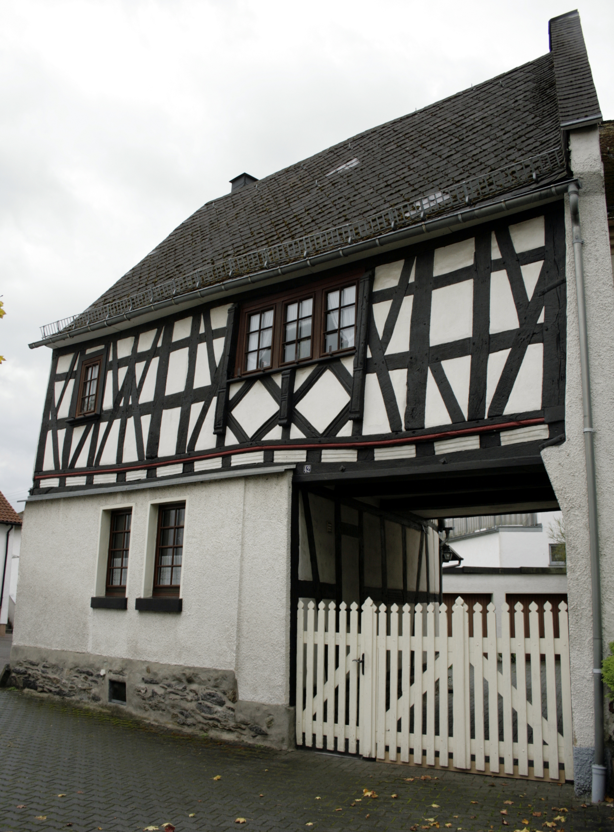 Ehemaliger Hof des Klosters Eberbach in Elz, Deutschland